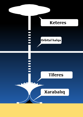 Battle Angel Alita dünyasının diaqramı.